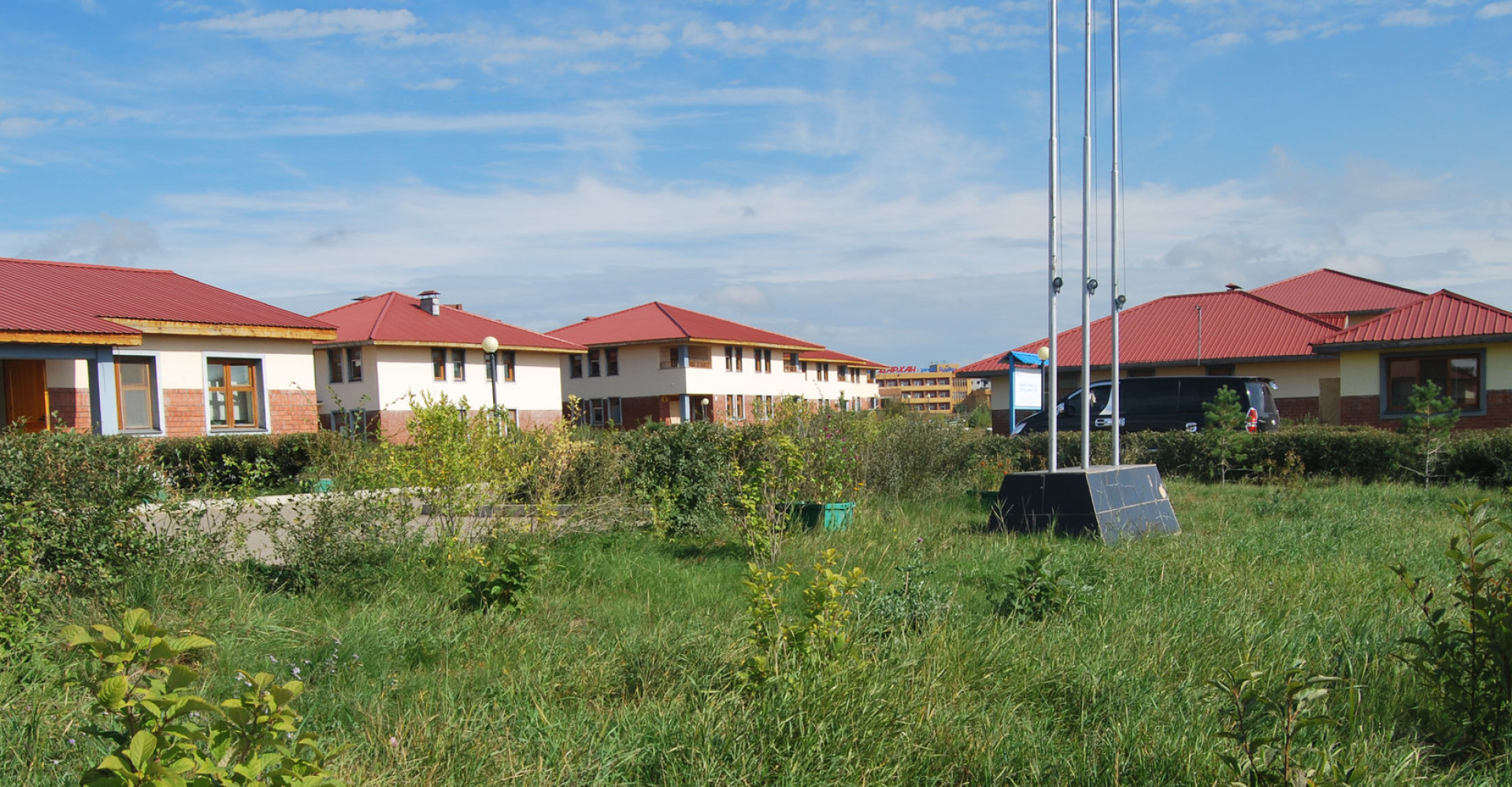 Các ngôi nhà ở Sharyngol, Darkhan-Uul, Mông Cổ